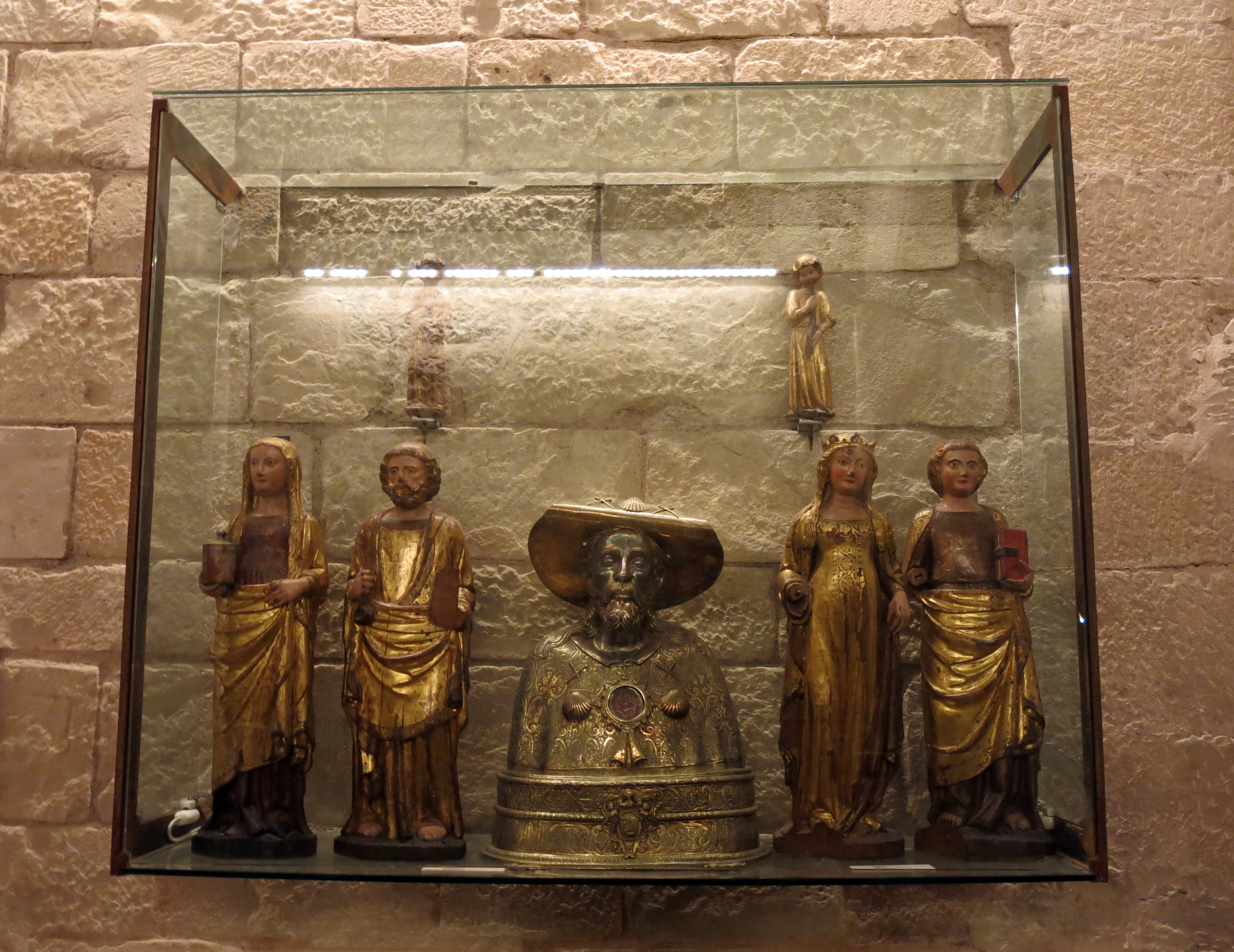 Catedral de Santa Maria (Tortosa)